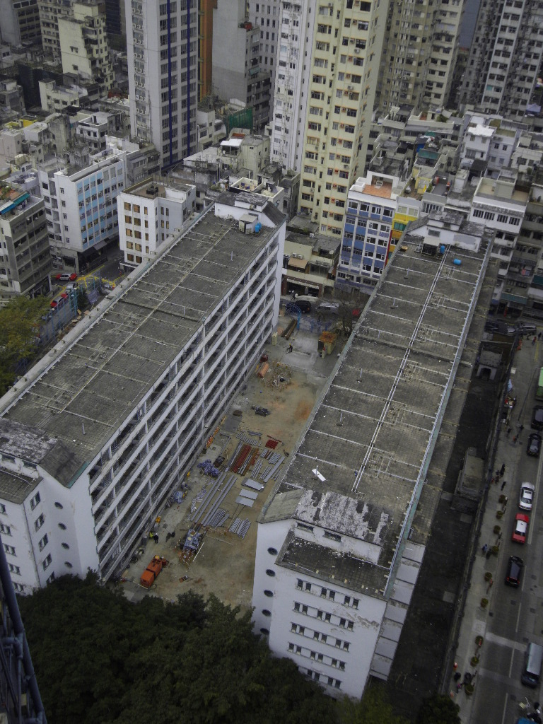 中文（香港）: 前荷李活道已婚警察宿舍, 香港